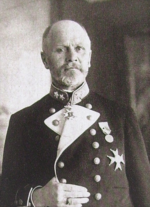 Gustaf Dyrssen (1858-1934) Swedish Admiral